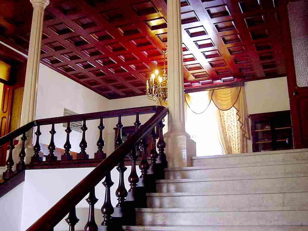 Antigo Paço Episcopal, mais tarde Junta Geral de Angra do Heroísmo, final da escadaria de acesso ao 2º andar